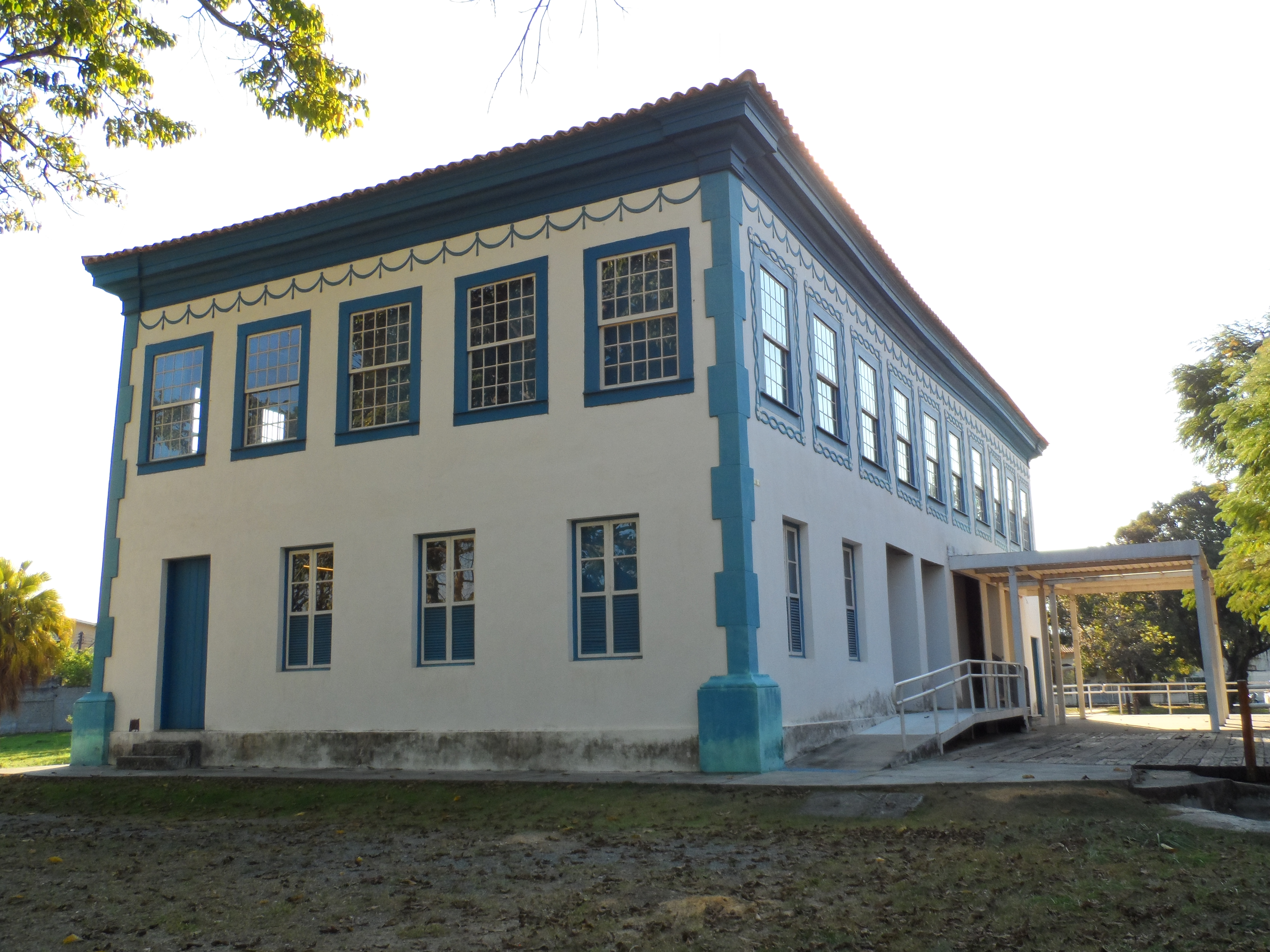 O Solar do Major Novaes foi a residência do rico produtor e exportador de café Major Manoel de Freitas Novaes, responsável pelo desvio dos traçados das estradas de ferro D. Pedro II (atual Central do Brasil) e Minas and Rio, (atual Centro-Oeste), para passar em suas terras, fatos que causaram o surgimento do núcleo urbano que deu origem à cidade de Cruzeiro. O casarão colonial foi construído em 1815, em adobe, no pavimento inferior, e pau-a-pique, no superior, estruturado com pilares e vigas de madeira. Foi tombado pelo CONDEPHAAT em 1969, restaurado, e hoje abriga o Museu Histórico e Pedagógico Major Novaes.